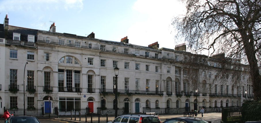 Fitzroy Square, Camden, London. East side.